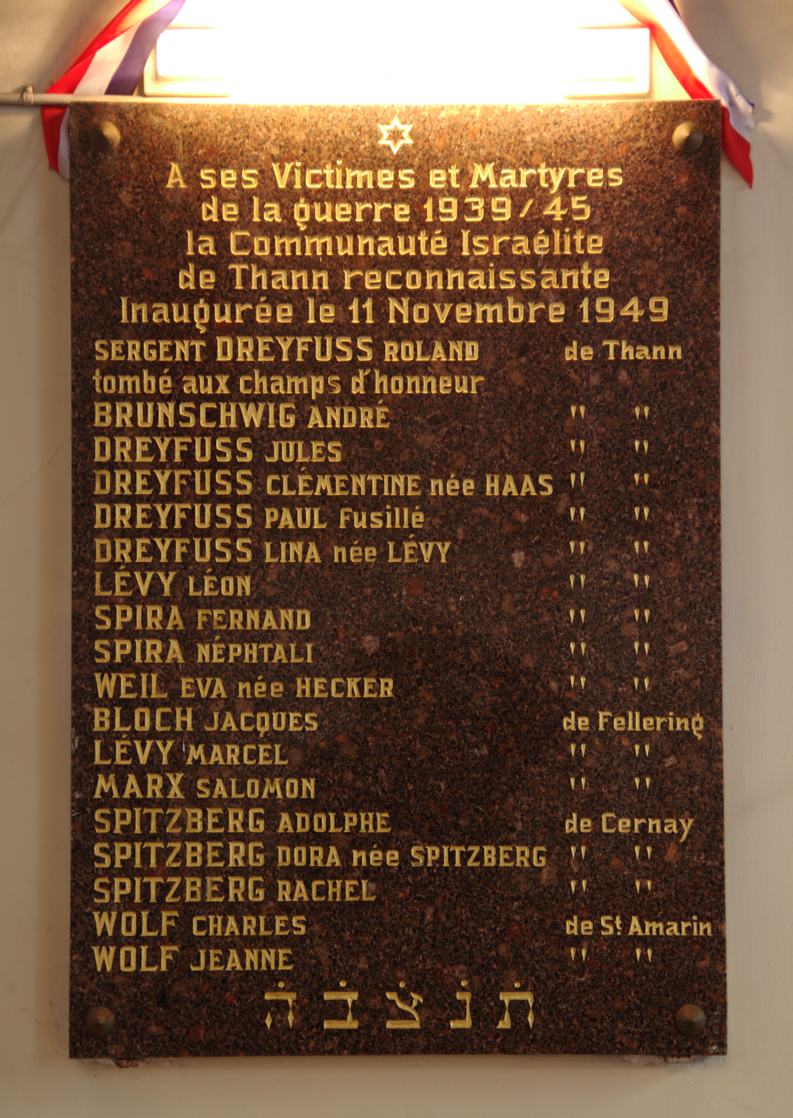 Thann (Haut-Rhin) la synagogue